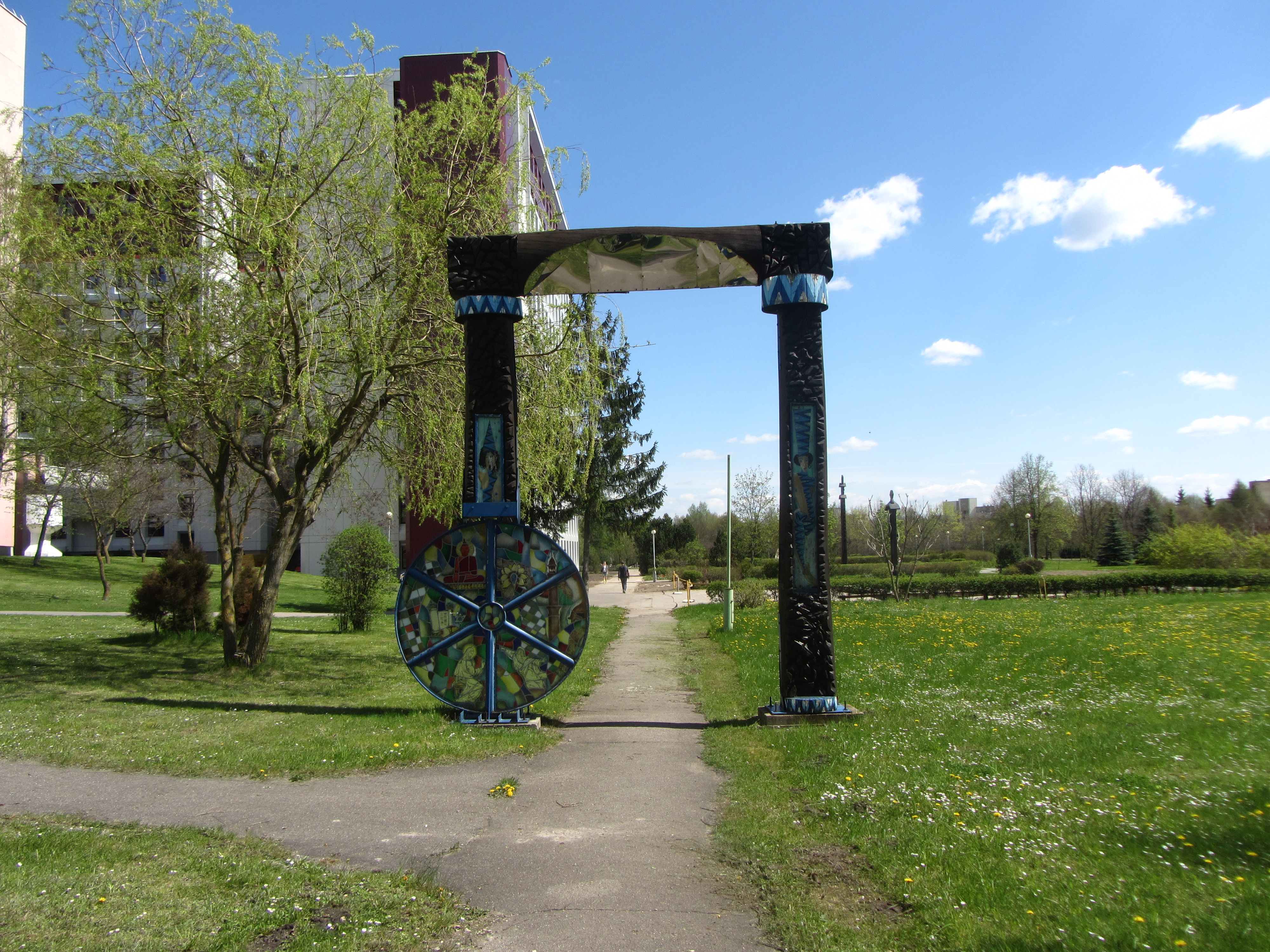 Vilnius, Lithuania